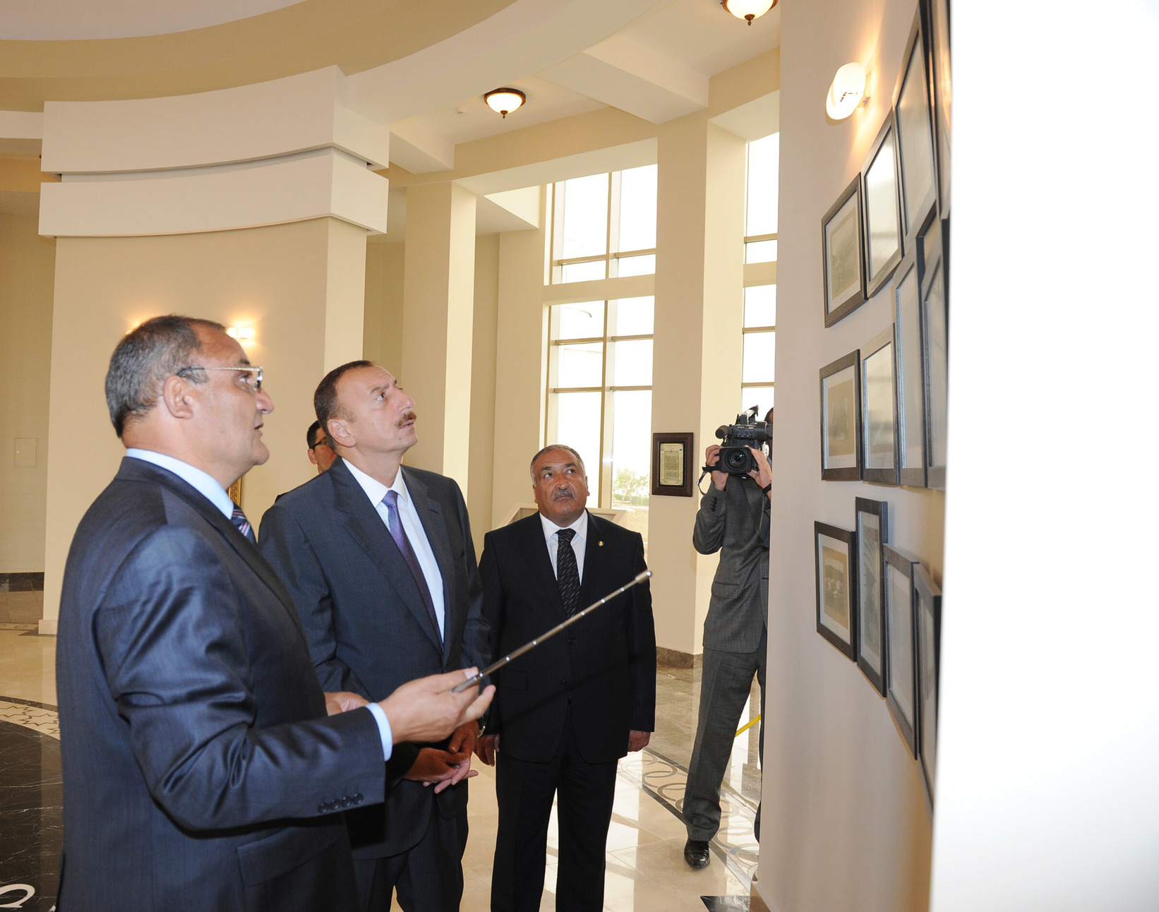 İlham Əliyev Şamaxı Astrofizika Rəsədxanasında aparılan yenidənqurma işləri ilə tanış olarkən